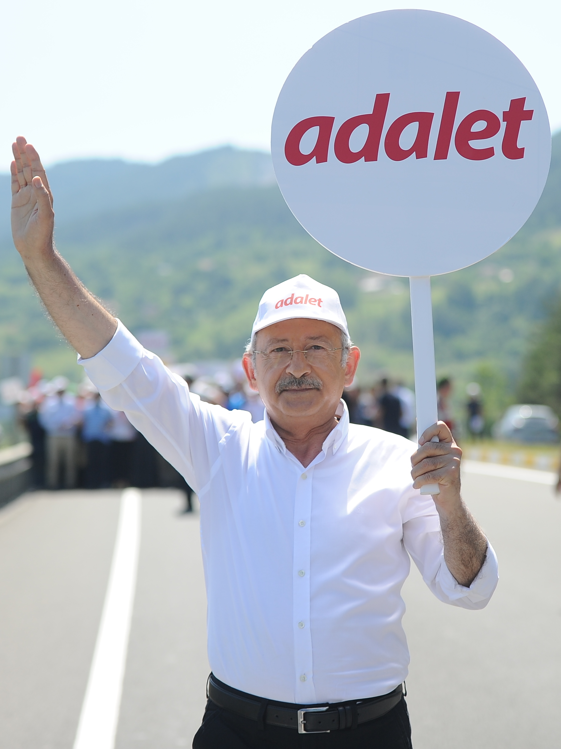 Kemal Kılıçdaroğlu'nun başlattığı Adalet Yürüyüşü'nde, Kılıçdaroğlu elinde adalet dövizi ile yürürken.